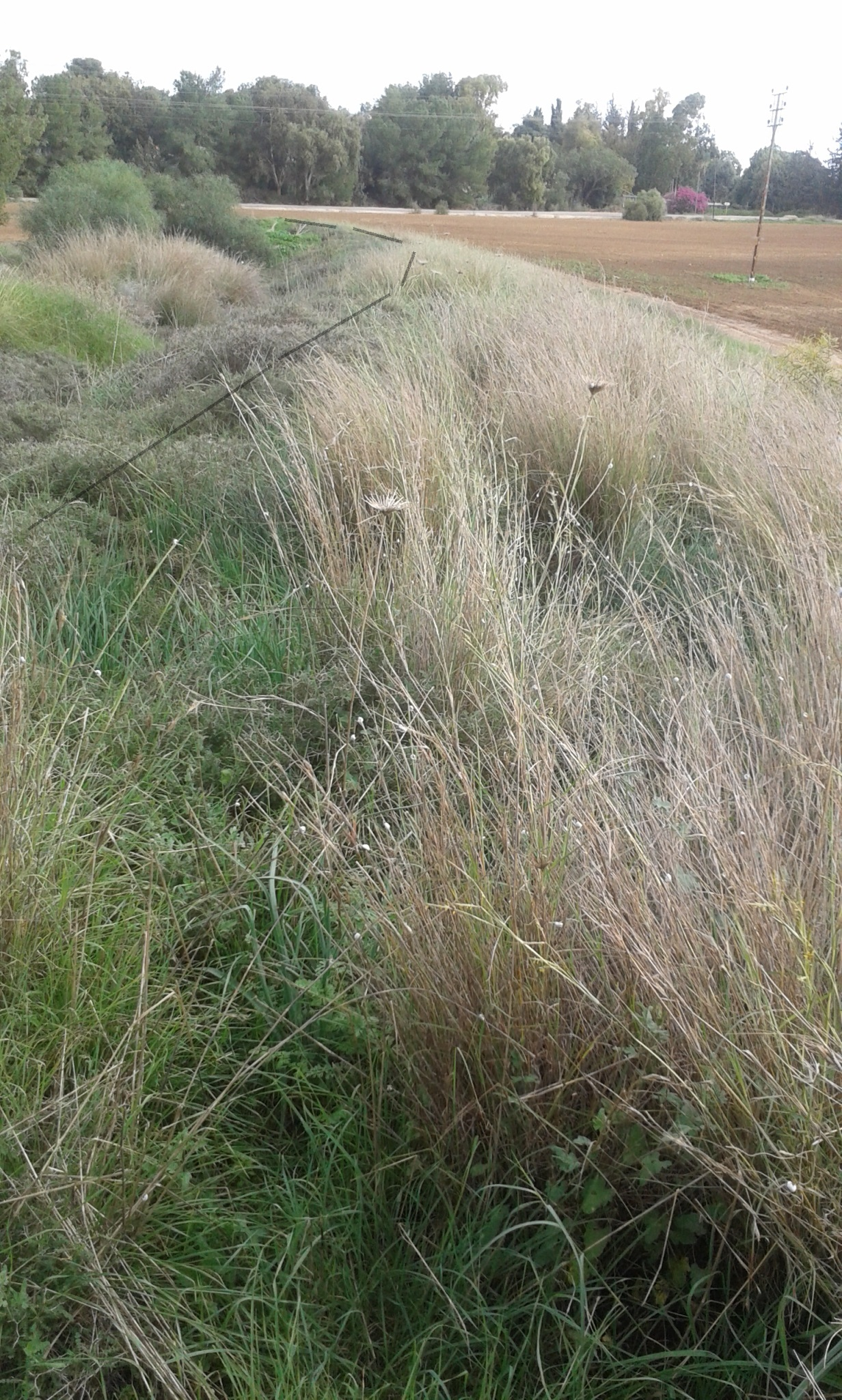 סוללת הרכבת לייד משואות יצחק - המסילה מתחנת נחל שורק לעזה